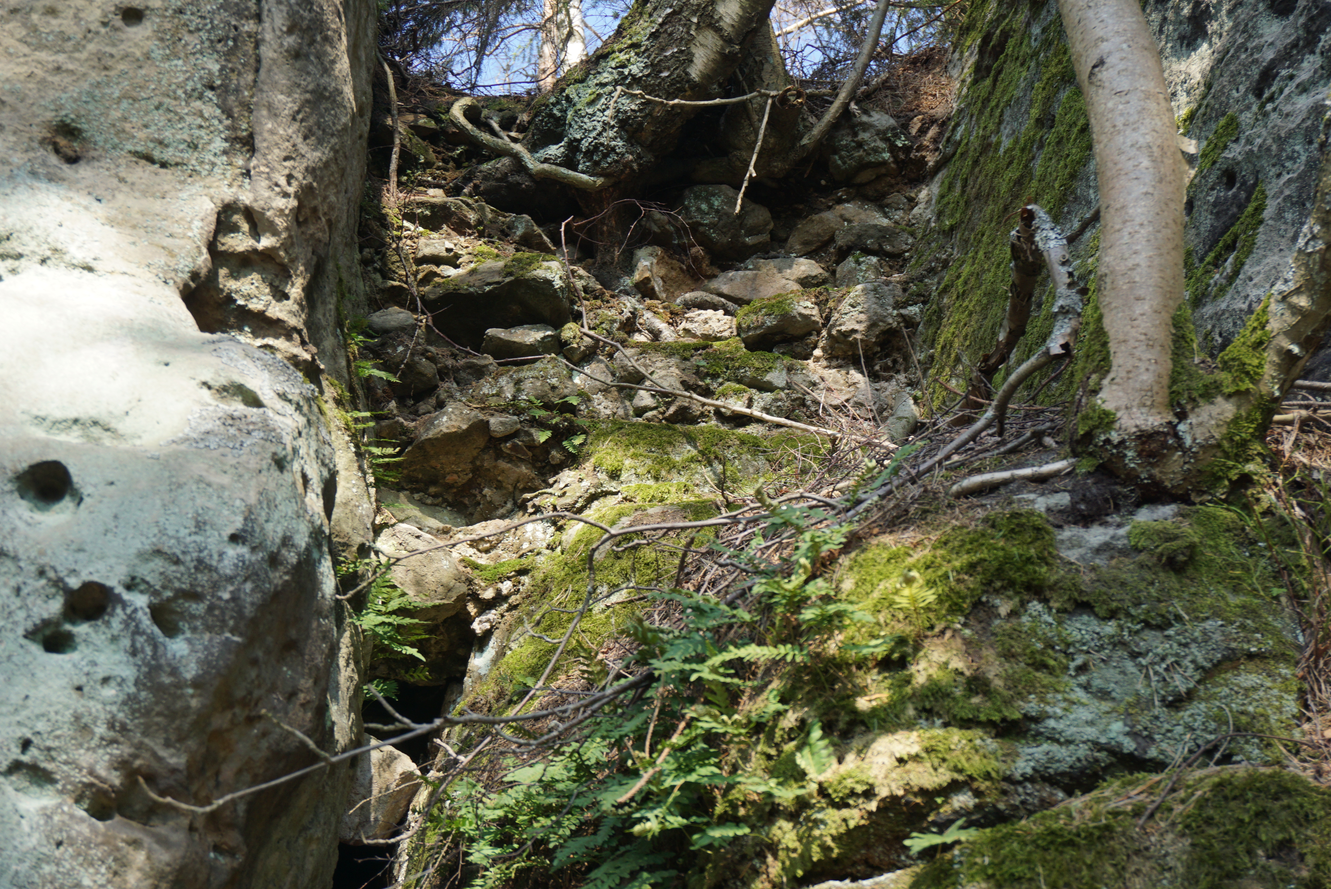 Hradiště Zámecký vrch, na Zámeckém vrchu, pp. 1461/1 (část), Heřmanice v Podještědí.